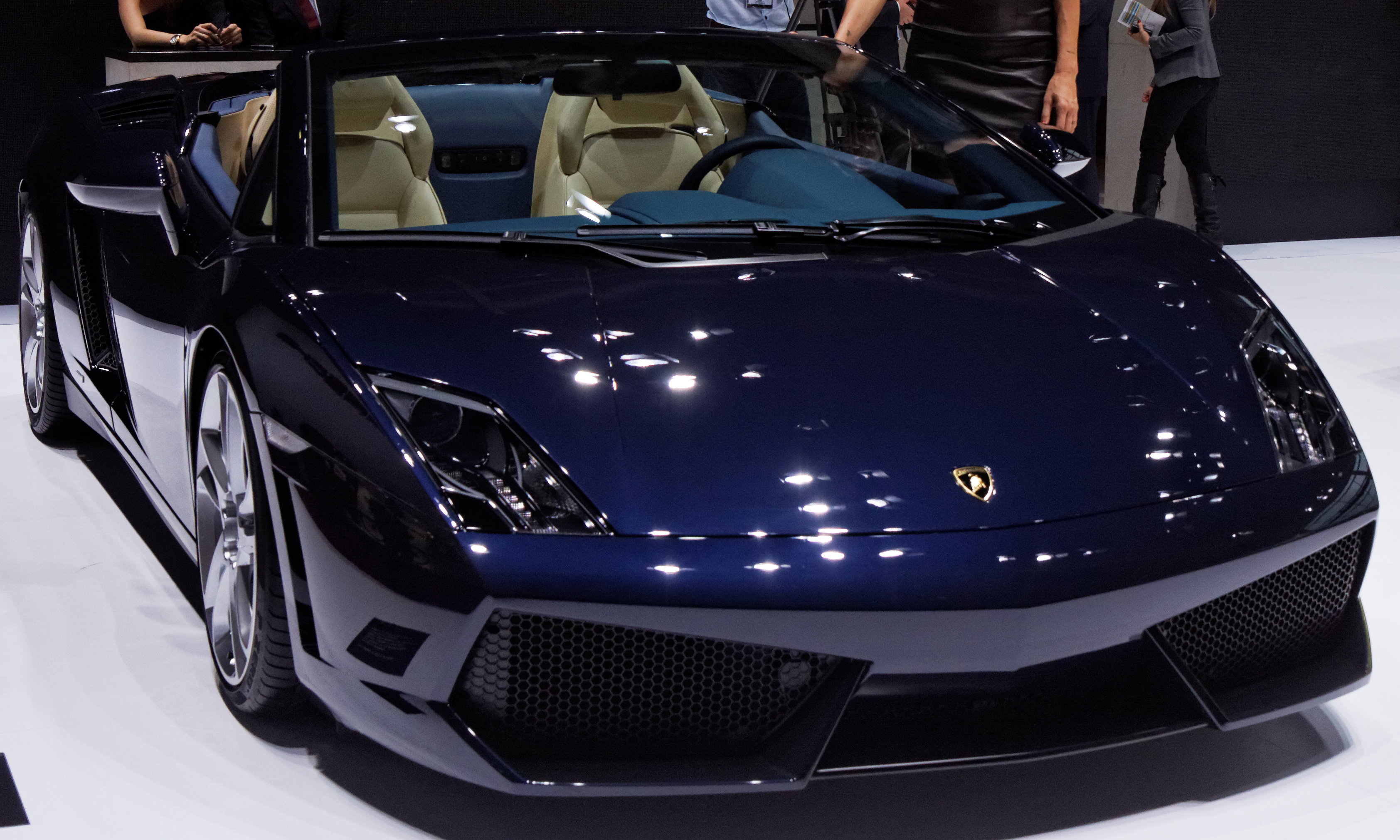 Une Lamborghini Gallardo LP 550-2 Spyder présentée lors du Mondial de l'Automobile de Paris 2012.